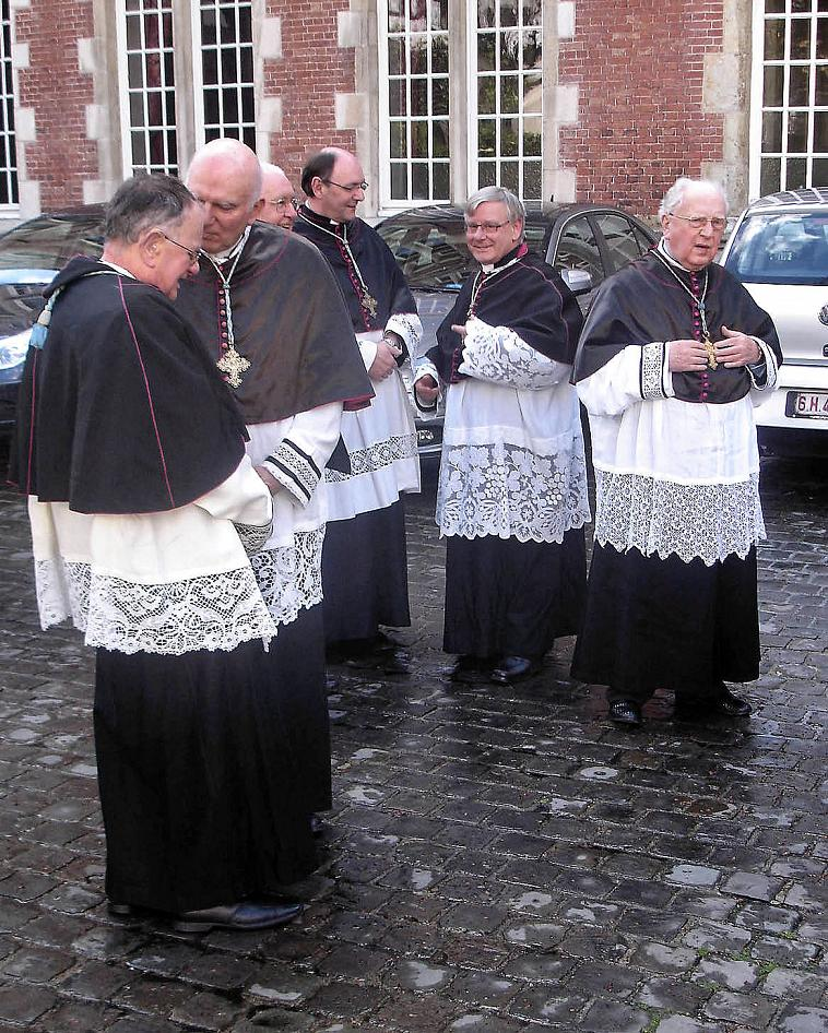 Heilig Bloedprocessie - Enkele kanunniken van het Sint-Salvatorskapittel te Brugge, 2008. vlnr. Leo Declerck Adelbert Denaux Paul Lambrecht Filip Debruyne Kris Depoortere Daniël Quartier